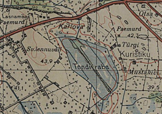 Tondi raba 1936. aasta Tallinna ümbruse kaardil